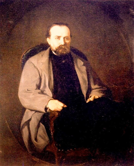 Il filosofo italiano Bertrando Spaventa (1817-1883) ritratto dal pittore Teofilo Patini (1869 circa, dipinto conservato al Museo di San Martino di Napoli)